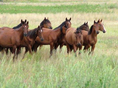 Табун одичавших лошадей в природном парке Цимлянские пески